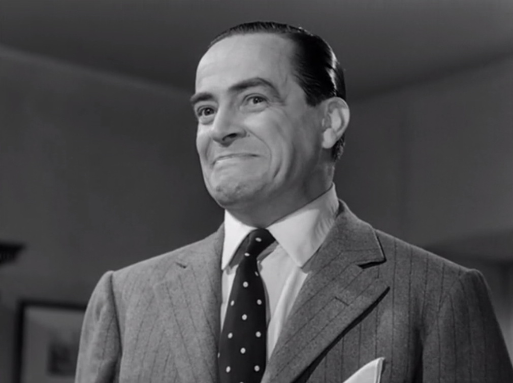 Screenshot dal film Accadde al commissariato (1954)